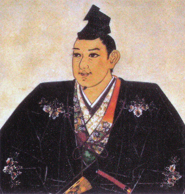 宇喜多秀家像（部分）